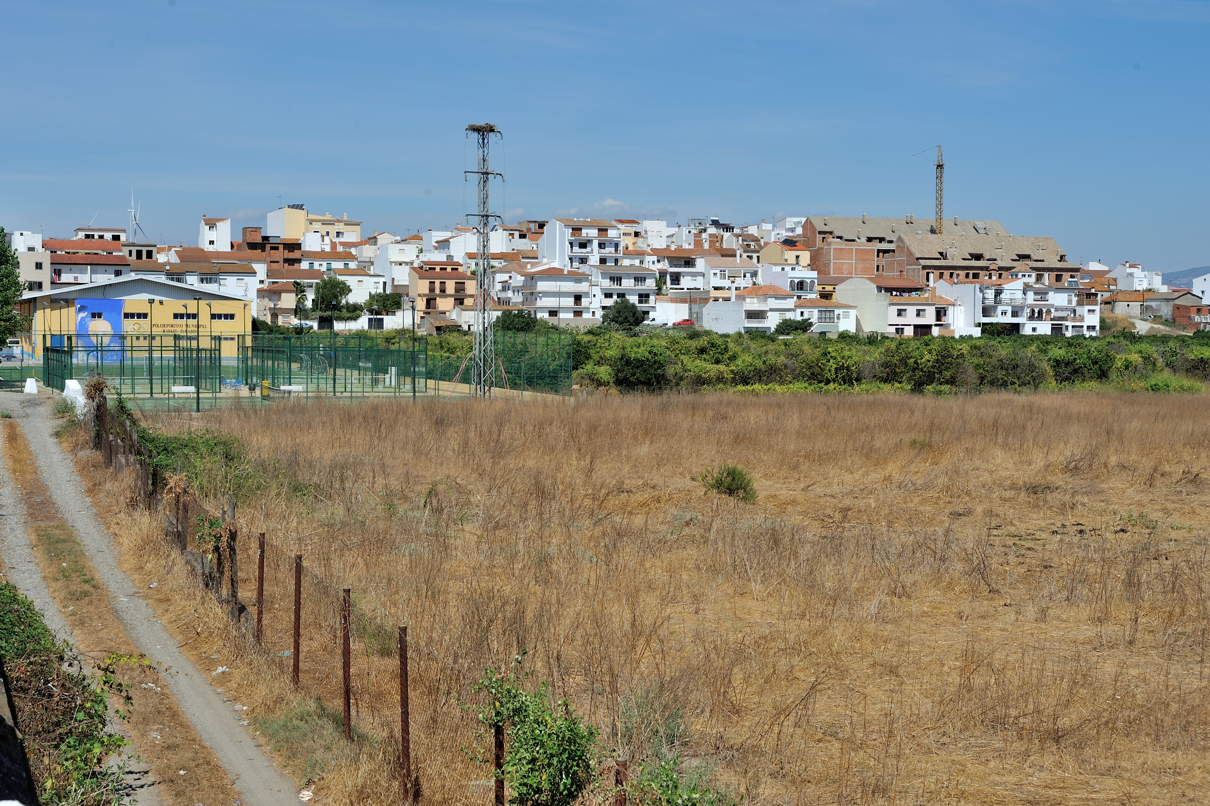 San Martín del Tesorillo, pueblo de la provincia de Cádiz.